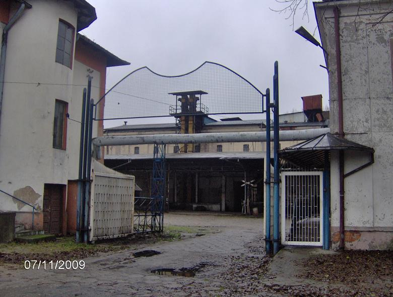 Brama wjazdowa do cukierni "Konstancja". Poźniej do getta żydowskiego